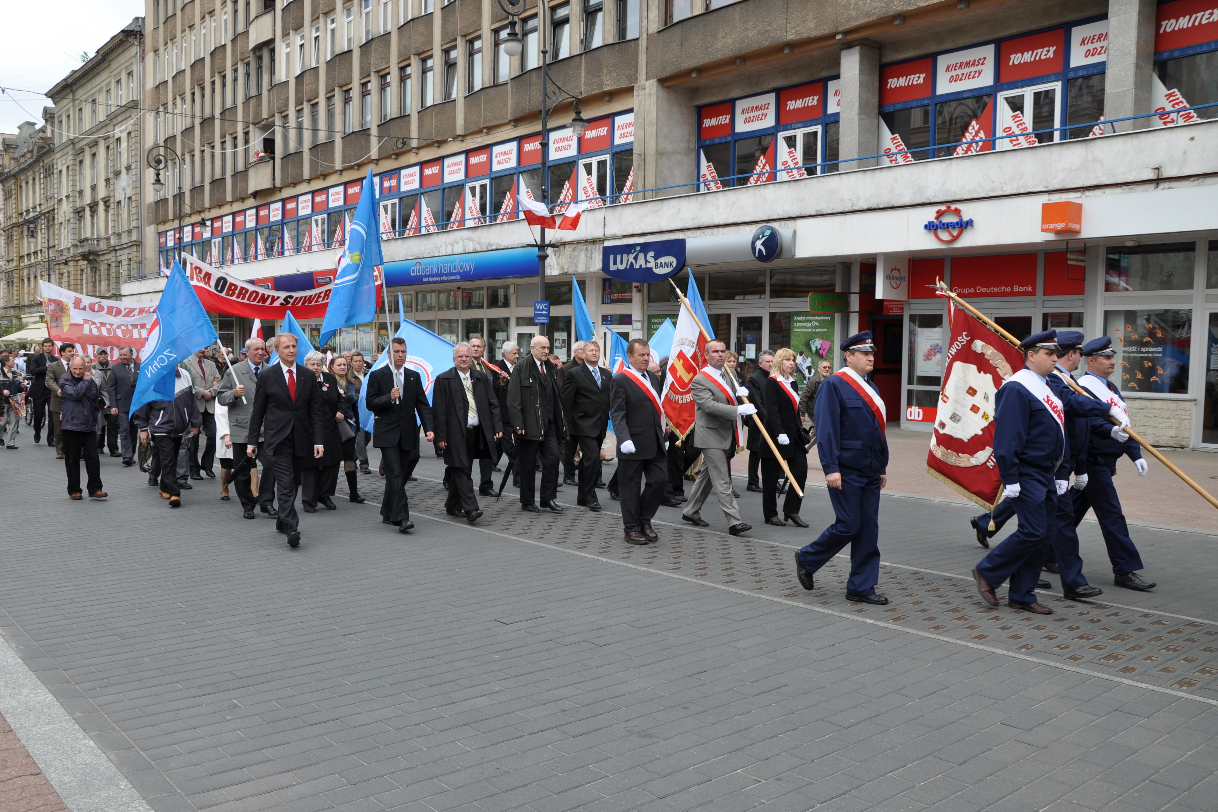 Pochód trzeciomajowy w Łodzi, na ul. Piotrkowskiej